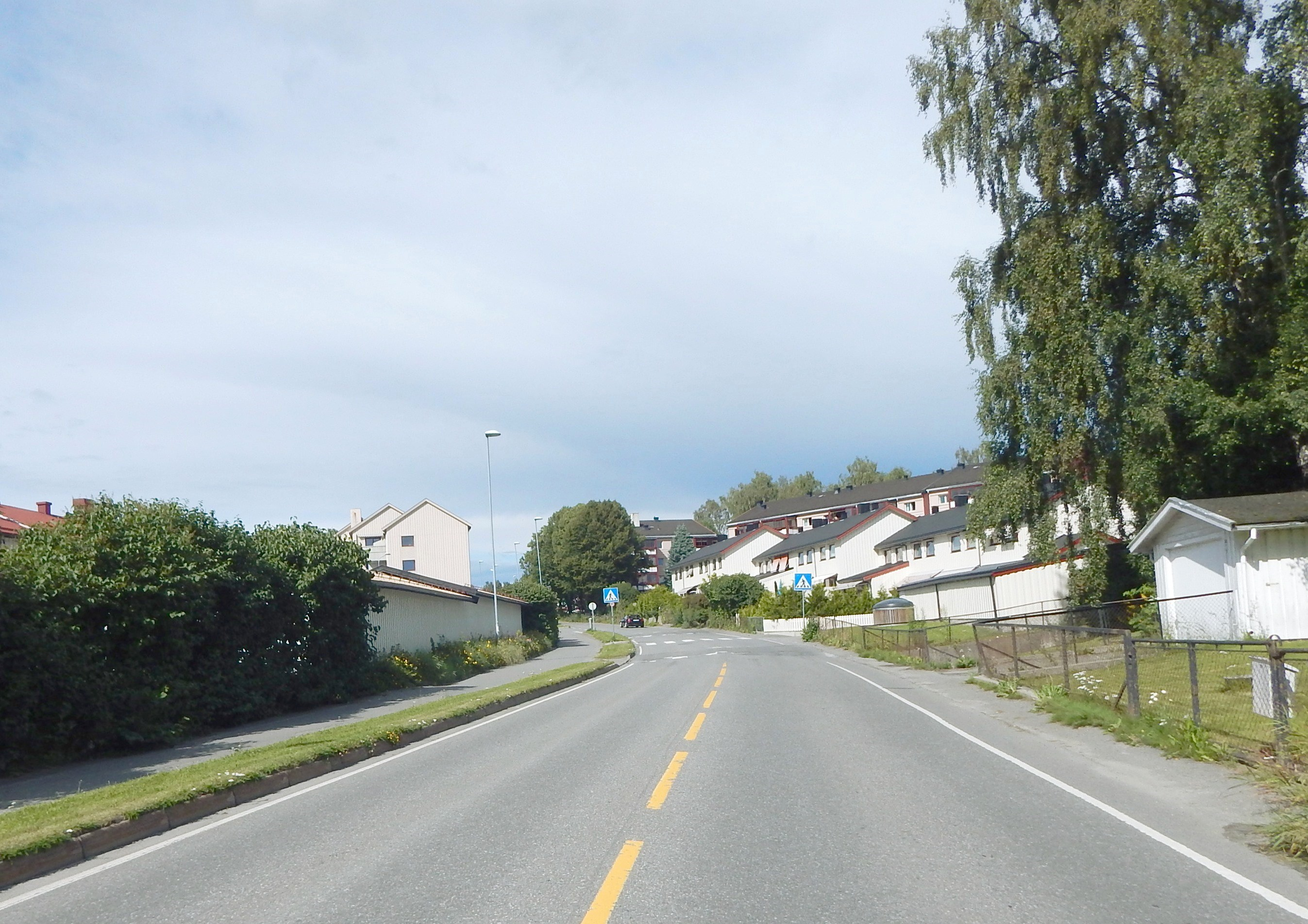 Solvangvegen på Hamar